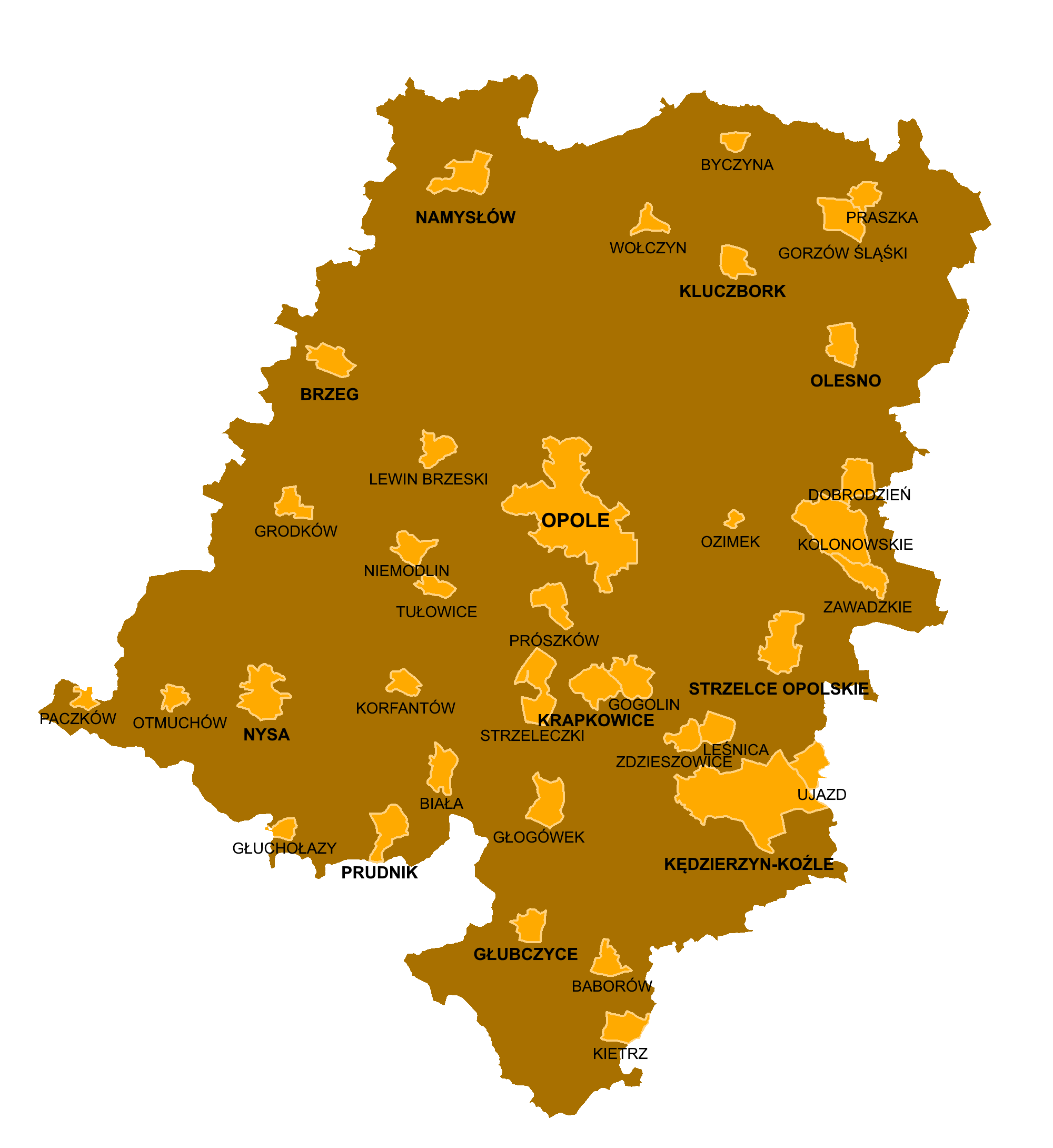 Miasta województwa opolskiego (stan na 29.03.2019).